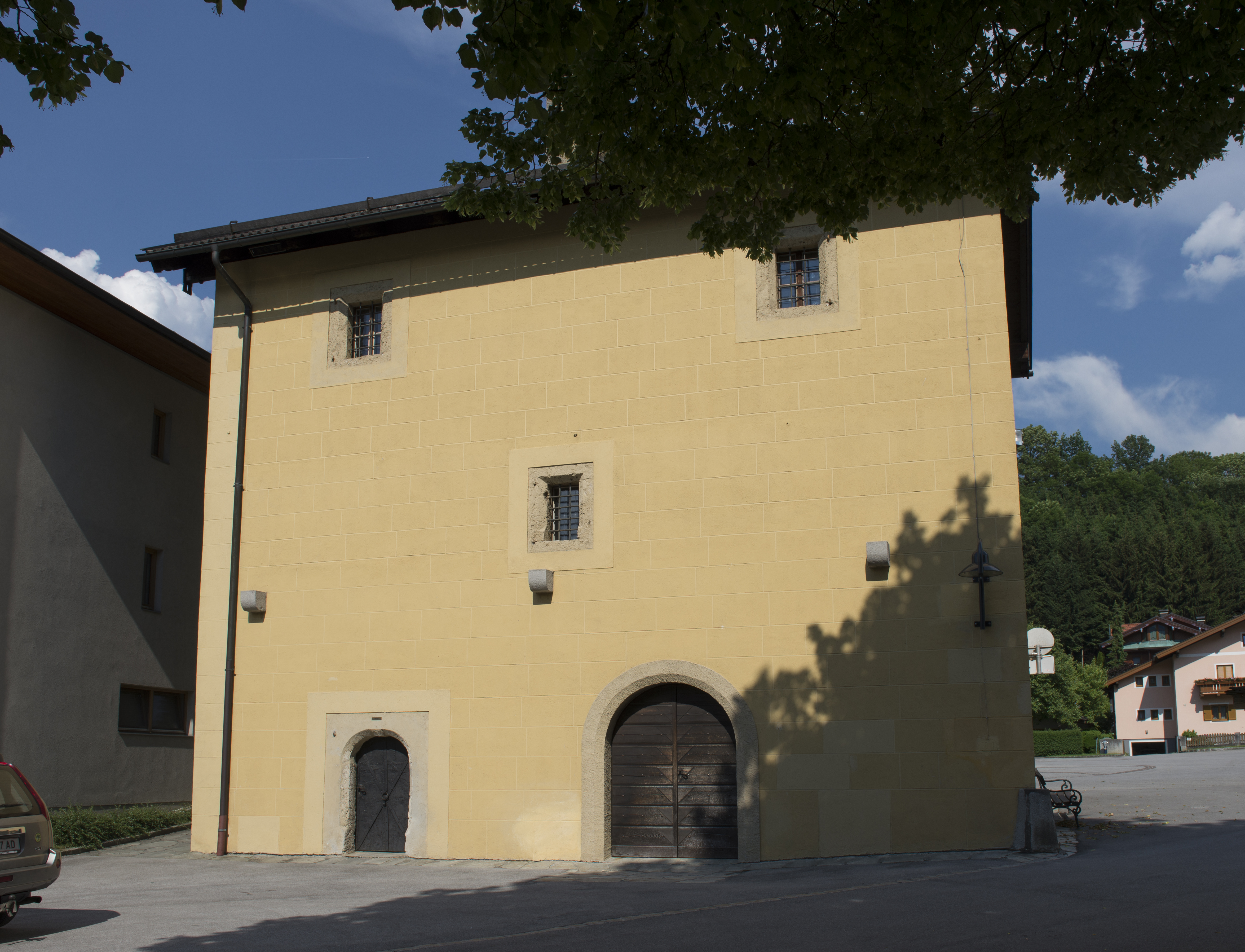 Kasten des Pfarrhofs von Pfarrwerfen